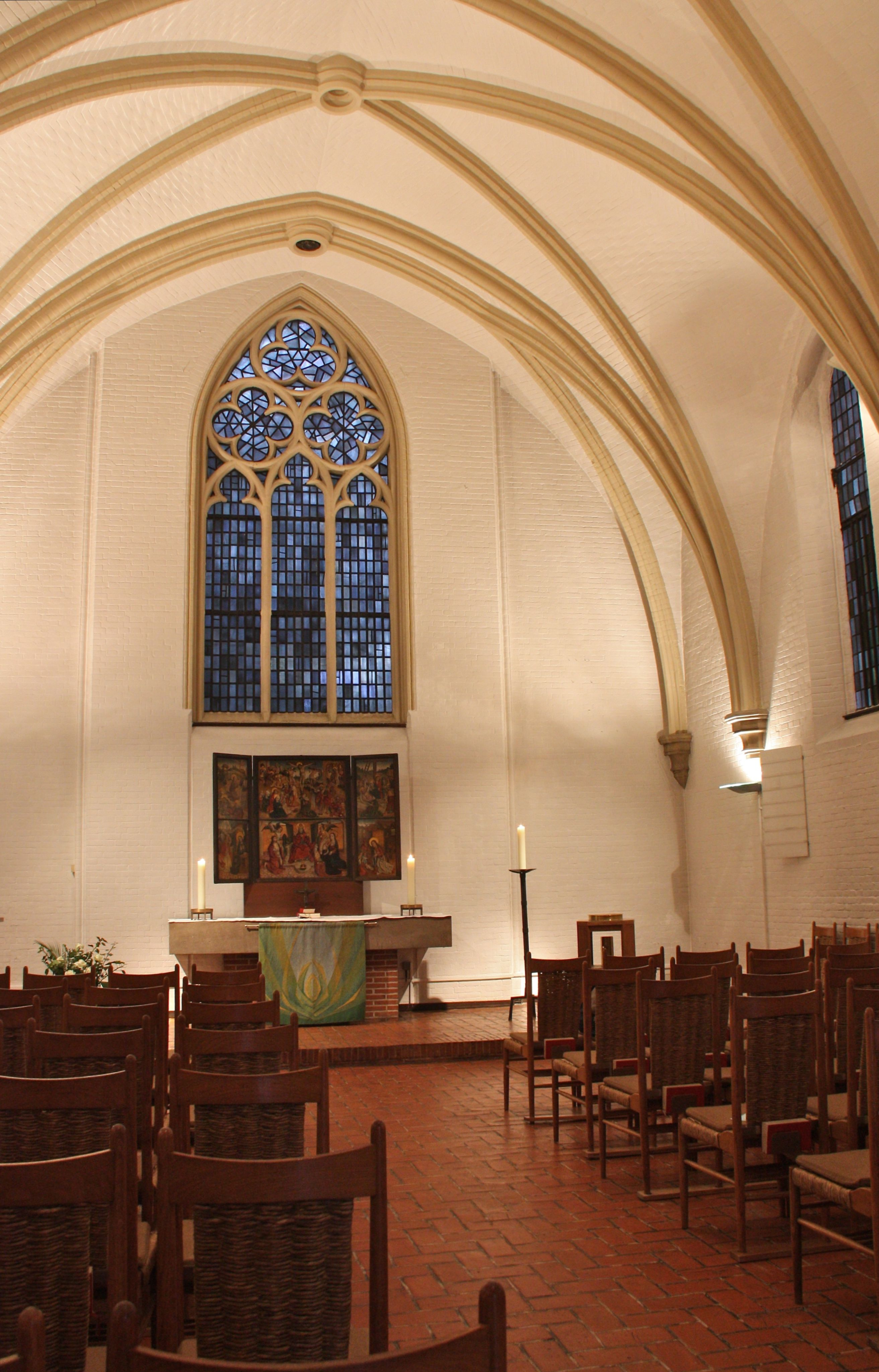 Hamburg, Osterkirche Eilbek, Kirchenraum